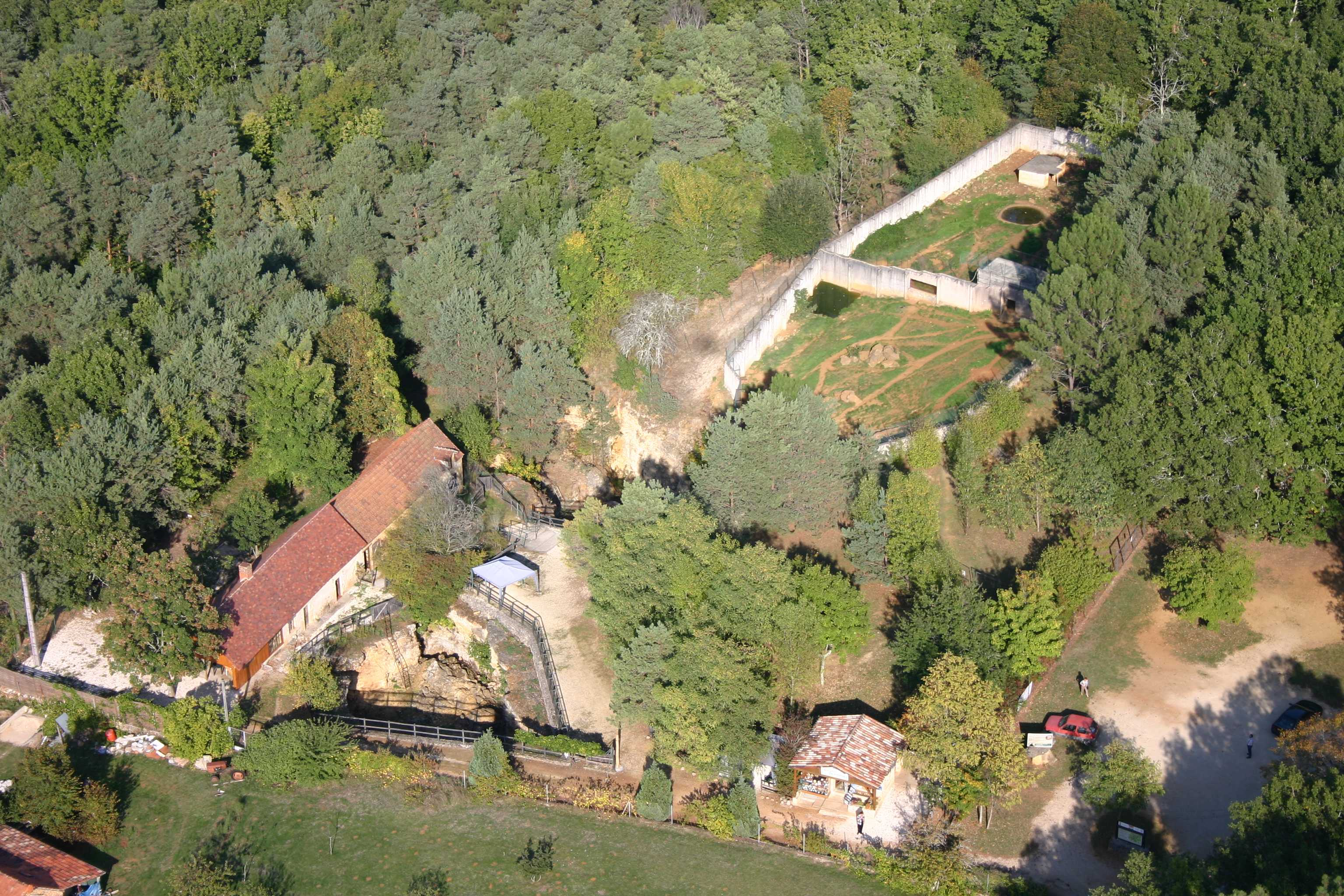 Vue aérienne du site historique du Regourdou